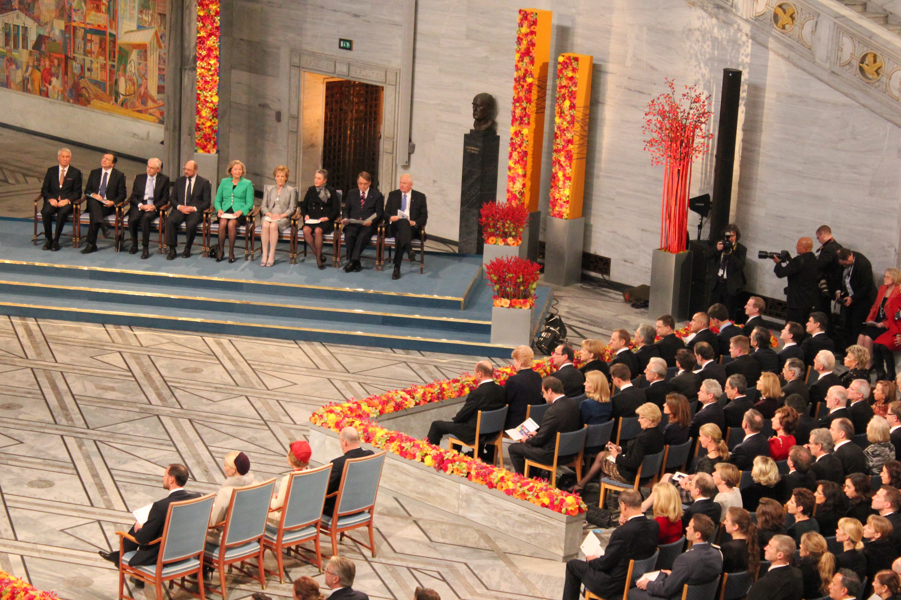 Ministru prezidents Valdis Dombrovskis Norvēģijas galvaspilsētā Oslo piedalās Nobela miera prēmijas pasniegšanas ceremonijā Eiropas Savienībai